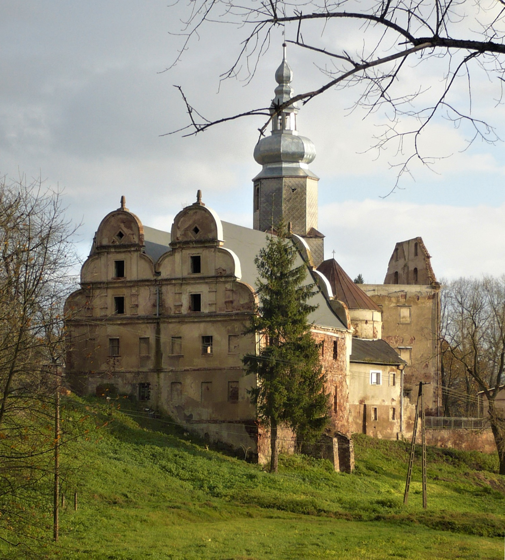 Zamek Sarny